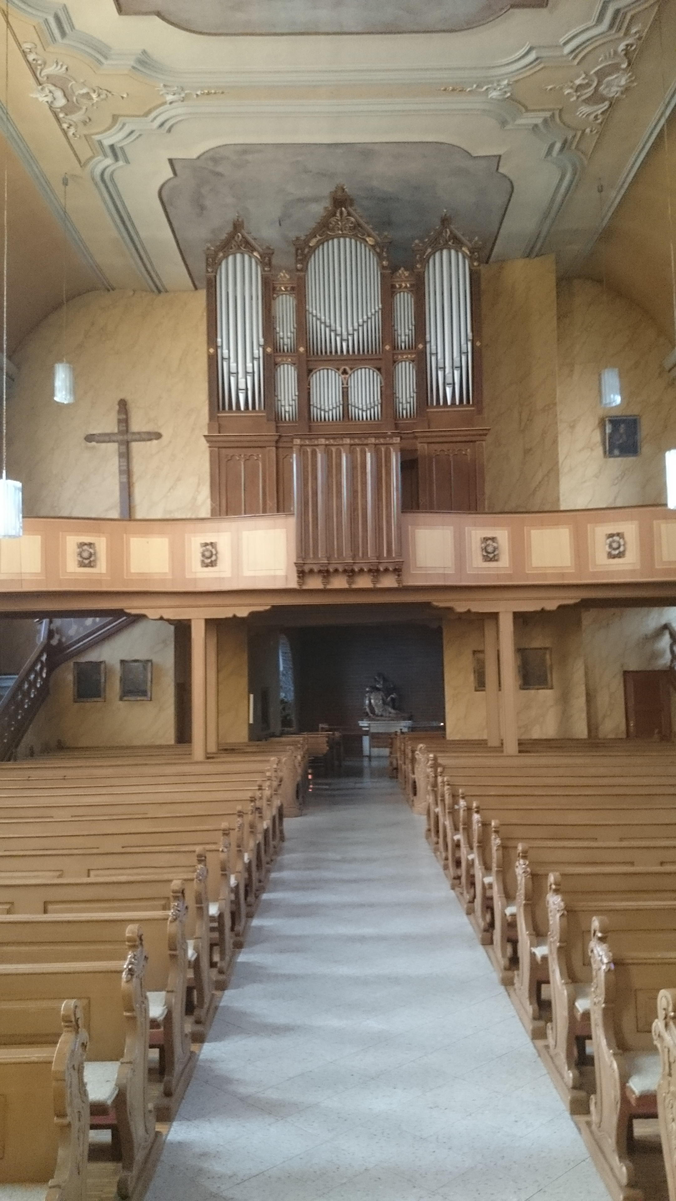 Die Louis-Krell-Orgel von 1882 in der Kirche St. Peter und Paul in Lindau